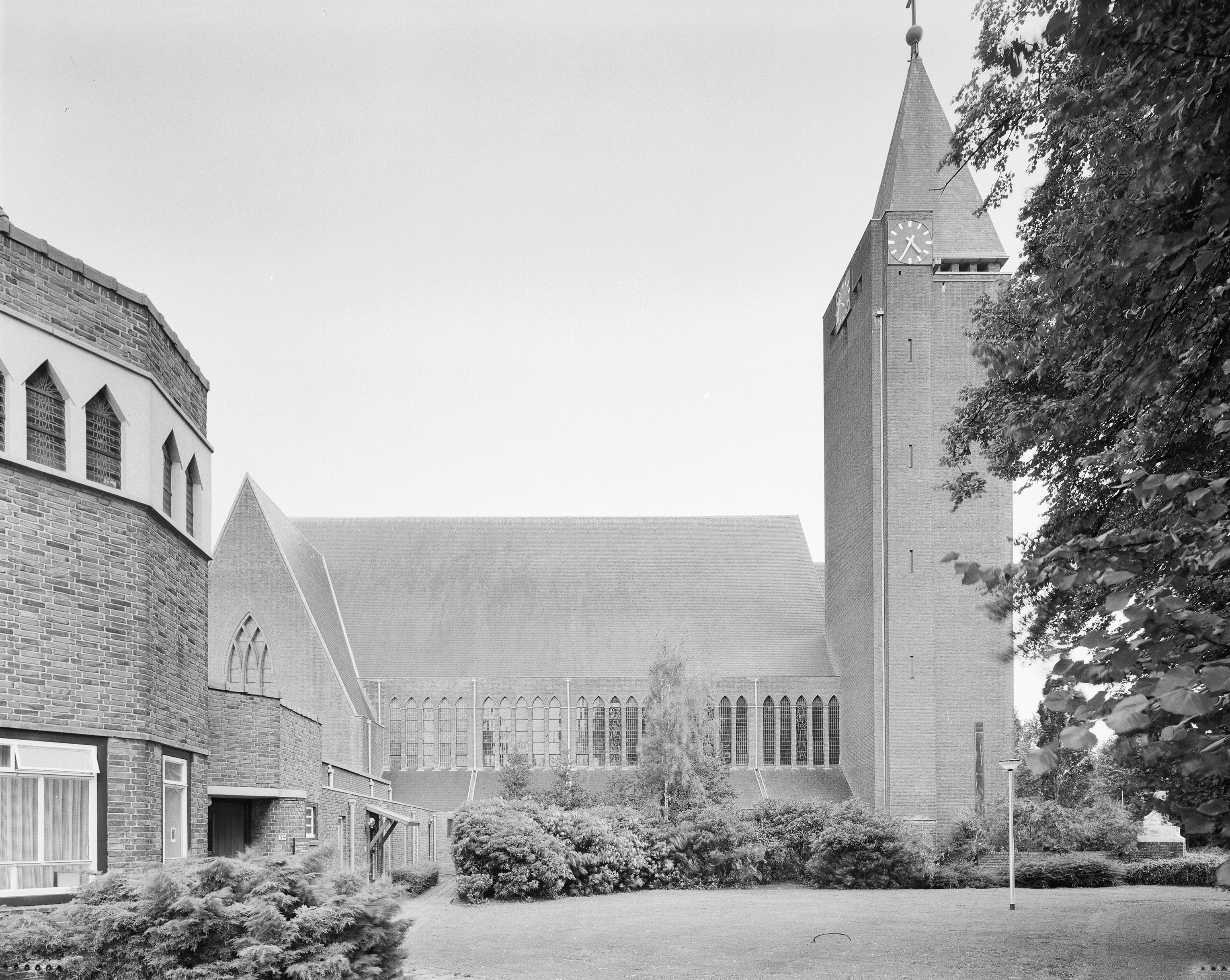 R.K. Kerk H. Hart Overhoven: Overzicht noordgevel met terzijde staande kerktoren (opmerking: Gefotografeerd voor Monumenten In Nederland Limburg)